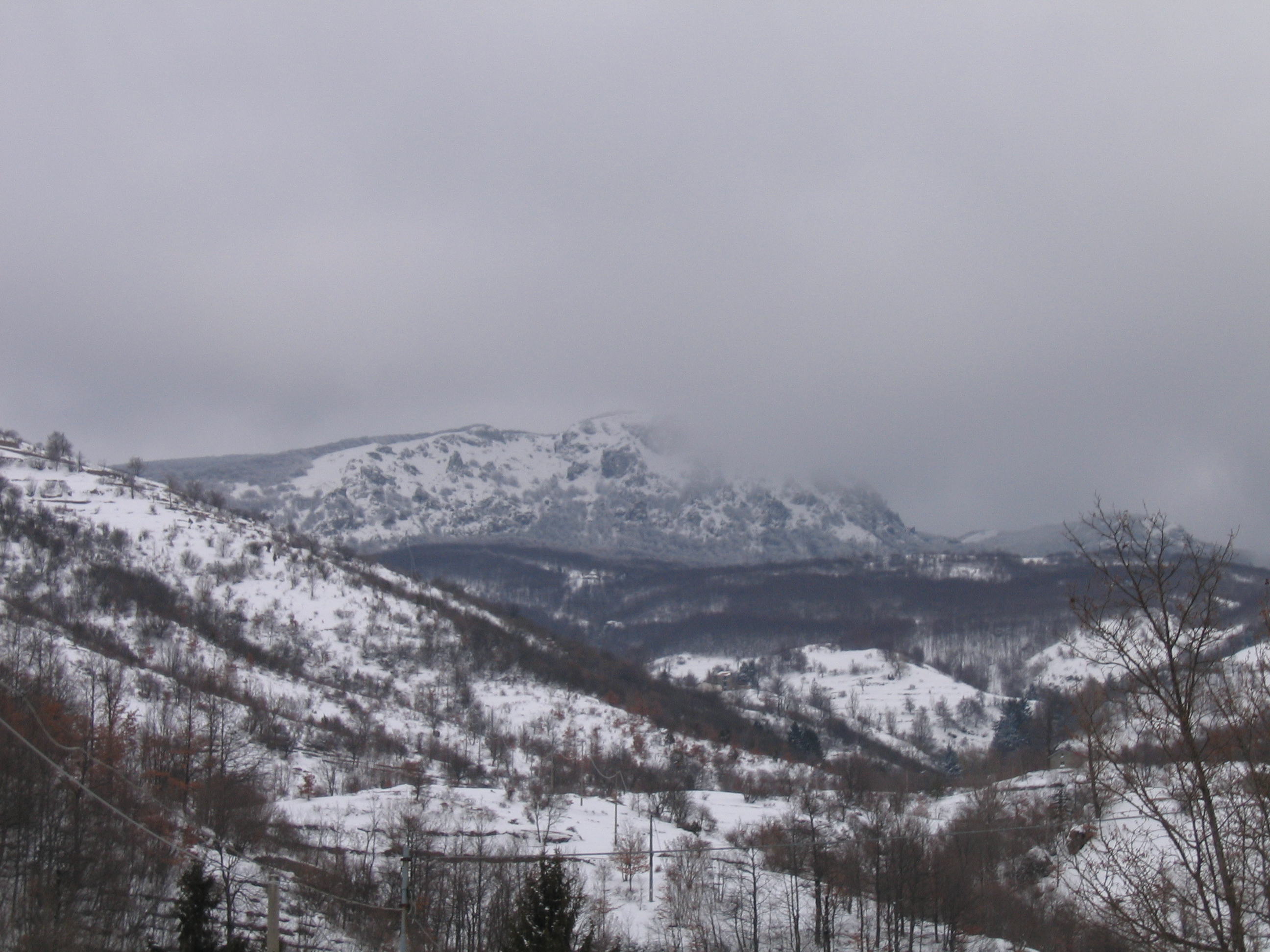 Foto: Immagine Monte Maggiorasca innevato visto da Alpicella d'Aveto Autore: Franco Luigi Mazza Proprietà: Franco Luigi Mazza